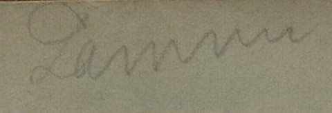 Unterschrift von Louis Lamm in einem Buch der Württembergischen Landesbibliothek Stuttgart